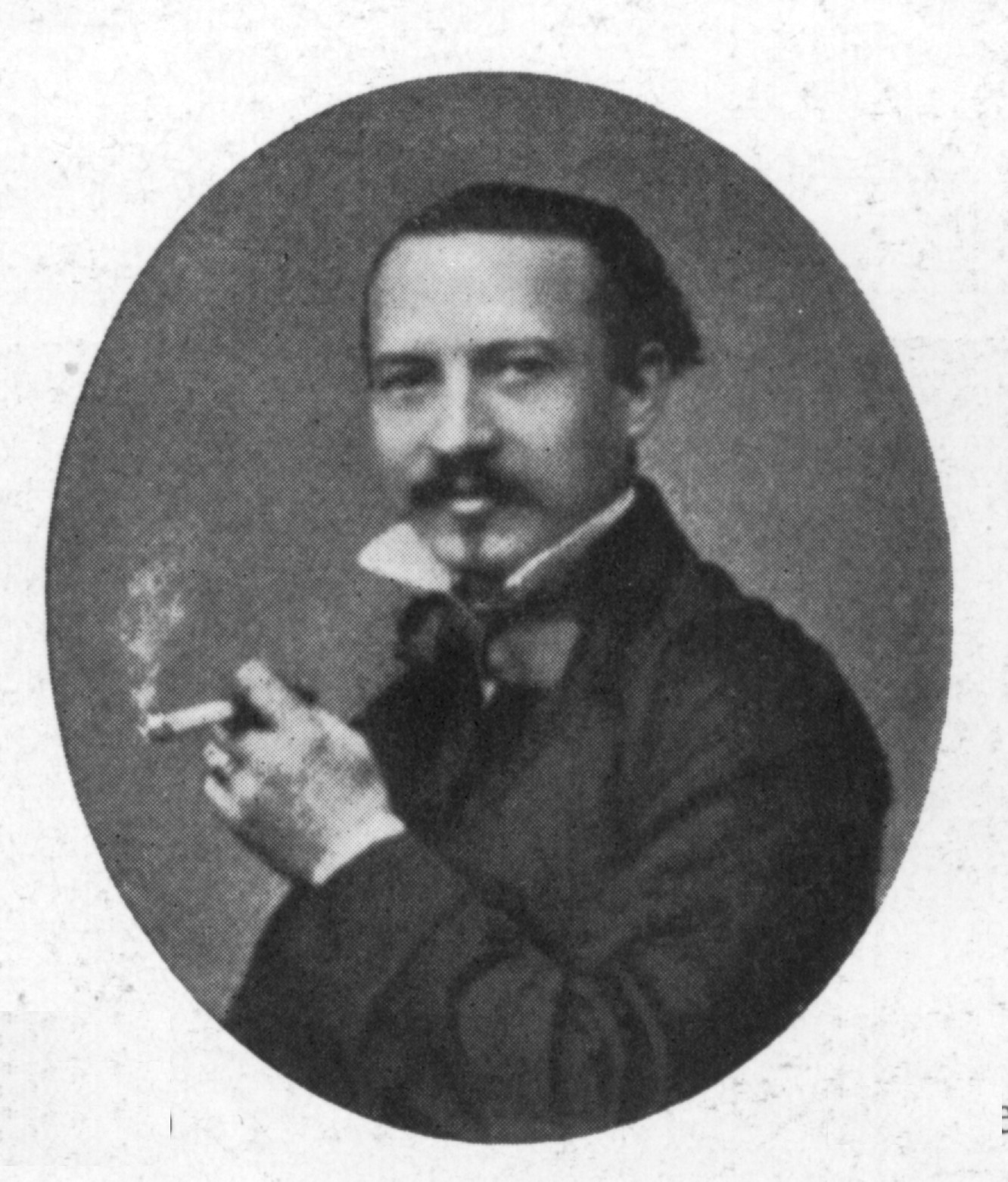 Selbstbildnis des Fotografen Karl Dathendey (1819-1896)